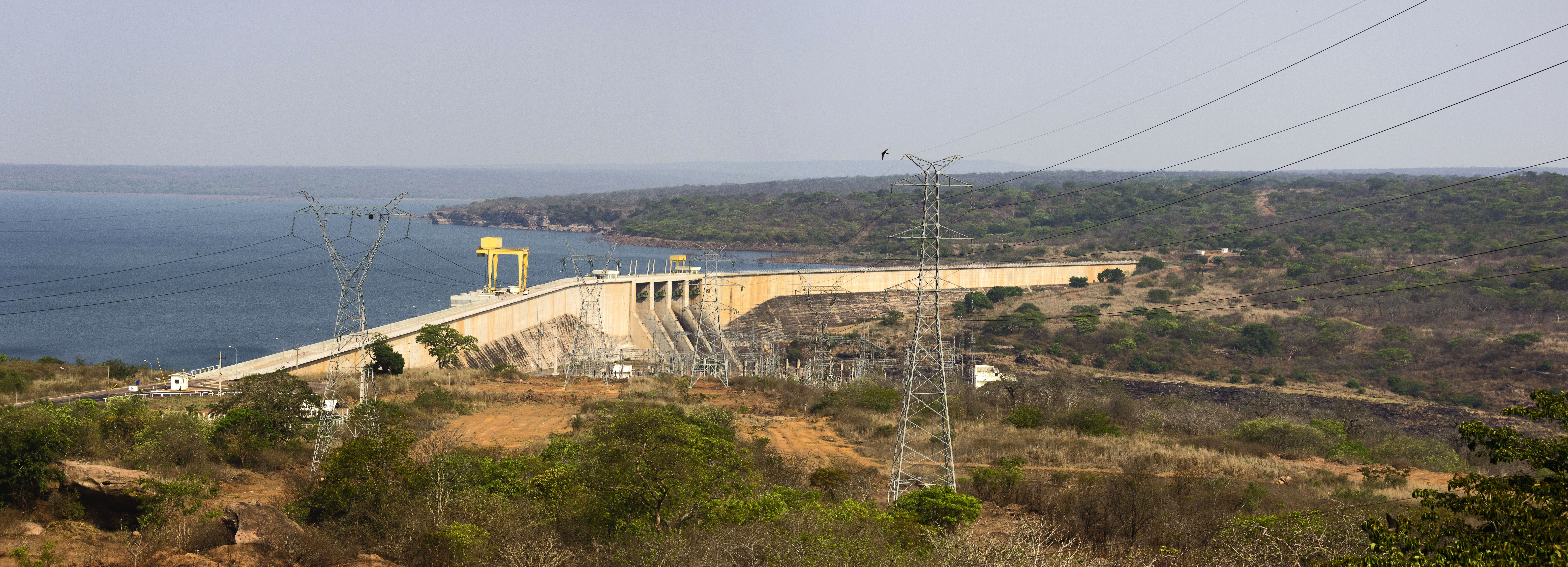 Панорама ангольской гидростанции Капанда с правого берега